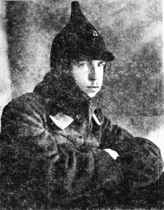 Vladimir Varankin kiel instruisto de kavaleria lernejo, urbo Tverj, 1925